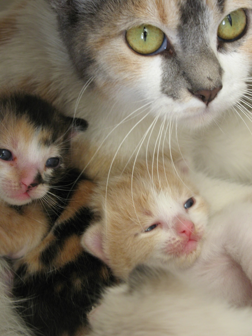 Trois chatons d'une semaine et leur mère